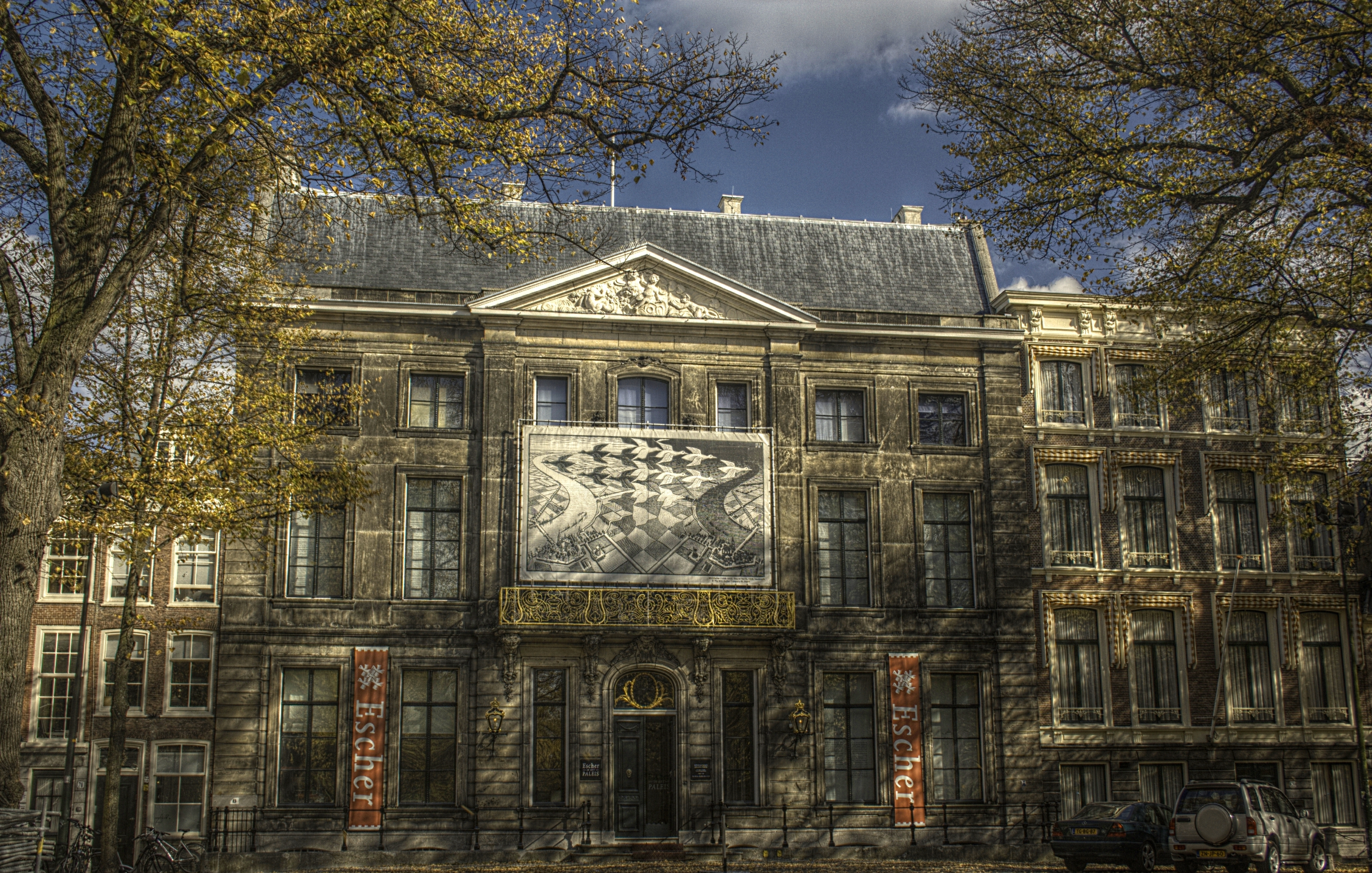 Escher Museum, Den Haag